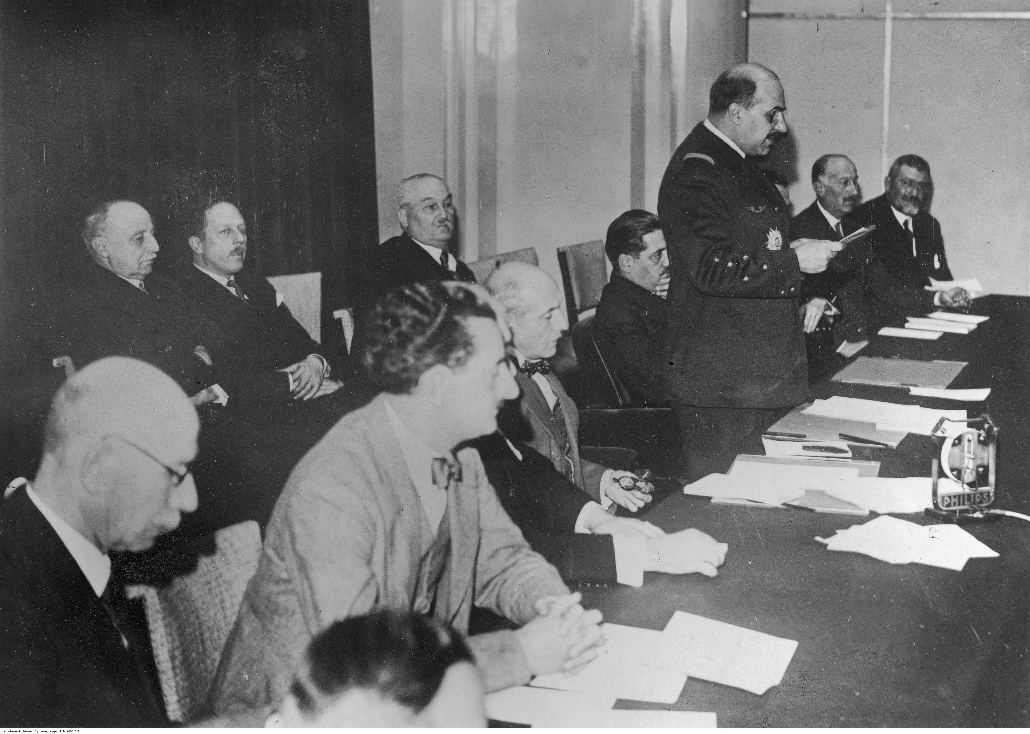 Posiedzenie inauguracyjne Międzynarodowego Salonu Lotniczego w Paryżu. Widoczni m.in.: Henry Potez (w środku w drugim rzędzie), Louis Bleriot (1. z lewej w pierwszym rzędzie), gen. Victor Denain (stoi), minister Francois Pietri, wiceminister lotnictwa Charles Delesalle (2. z lewej w pierwszym rzędzie), minister przemysłu i handlu Laurent Eynac (siedzi na prawo za gen. Denainem).